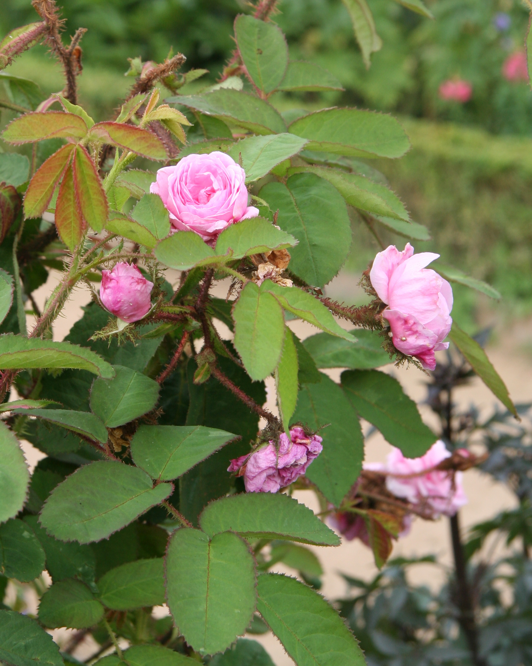 Rosa 'Communis' im Botanischen Garten Hamburg